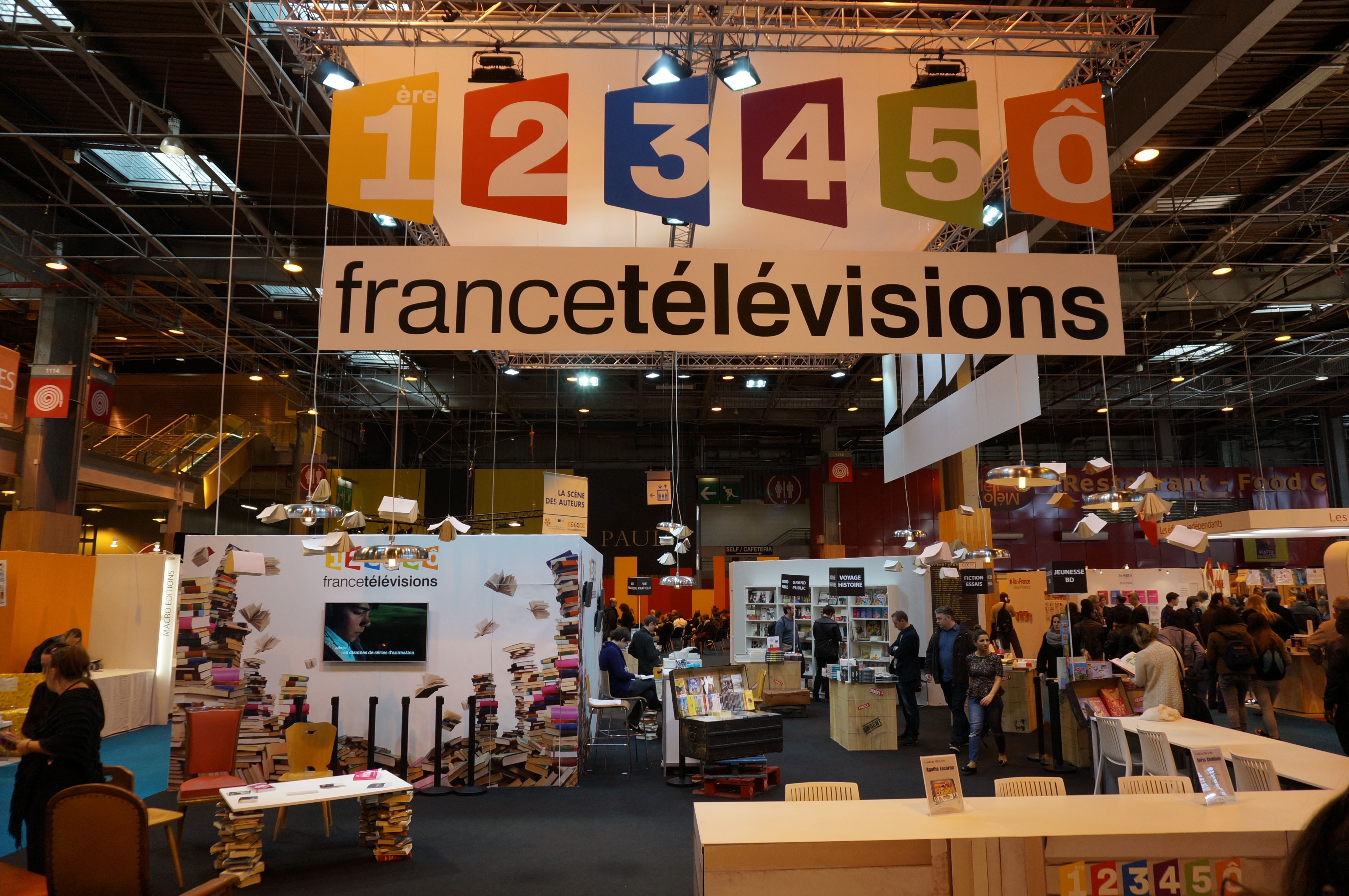 lors du salon du livre de 2015.